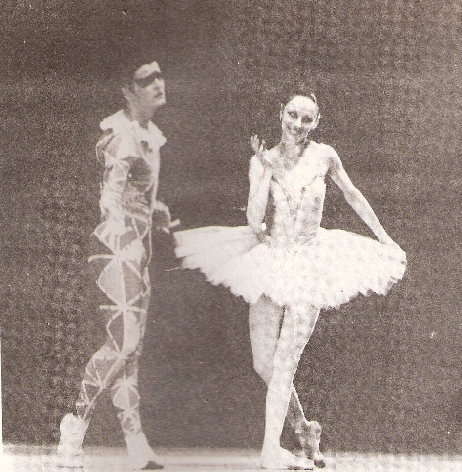 bailarin sovietico Mijail baryshnikov